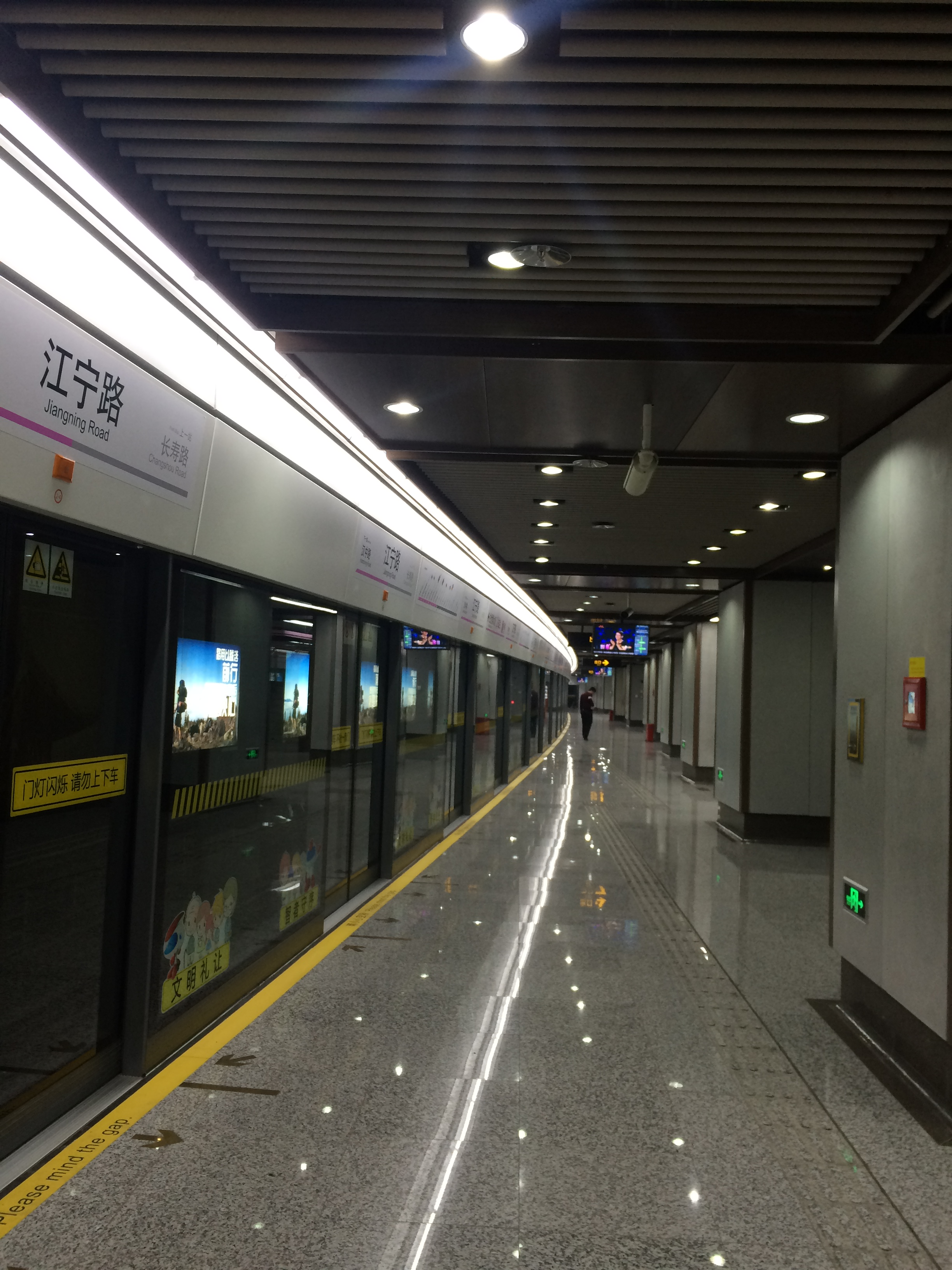 上海地铁13号线江宁路站下行站台